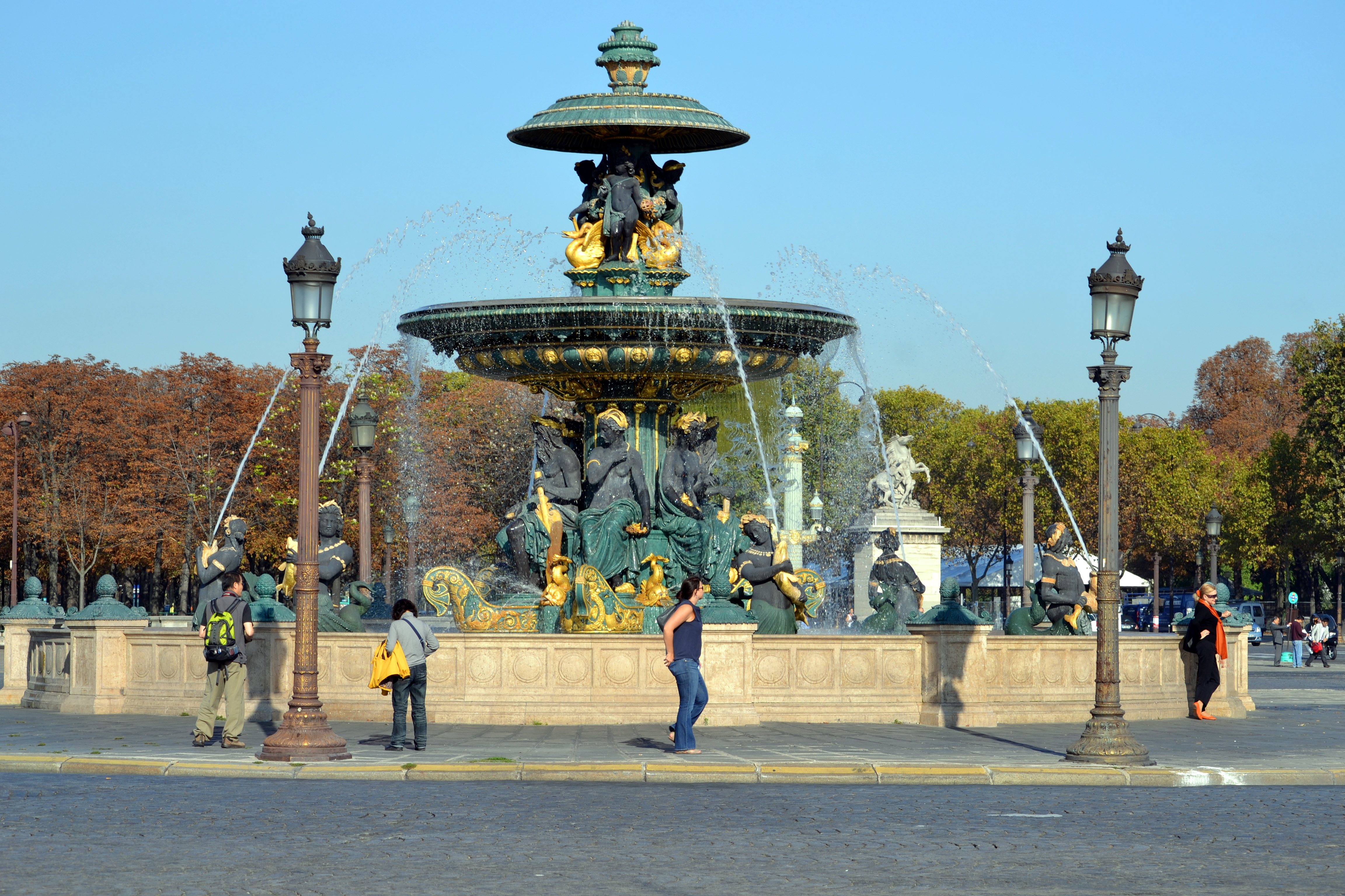 Fontaine des Mers, September 24, 2011.